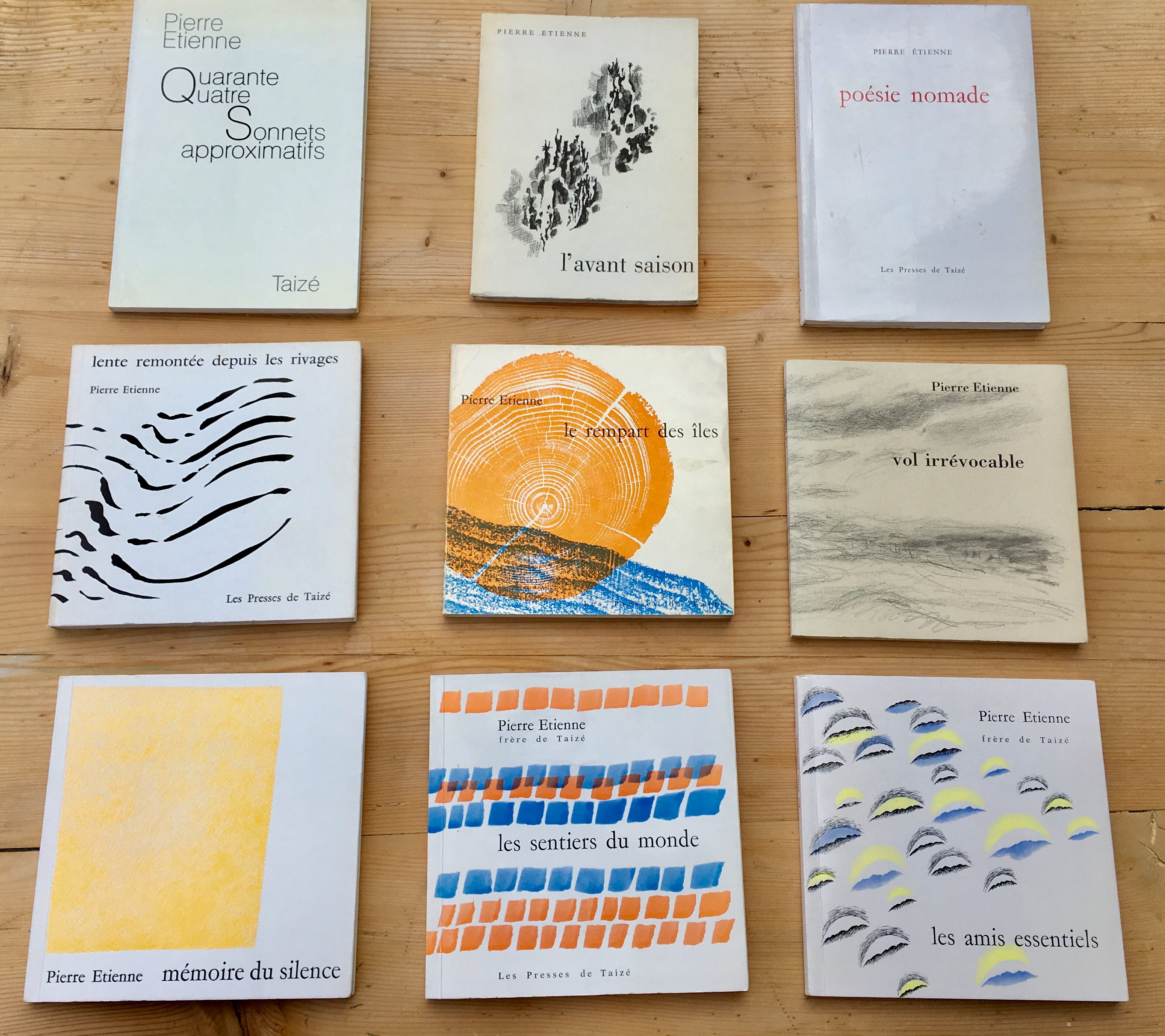 Collection de livres écrits par le poète Pierre Etienne de Taizé Août 2018